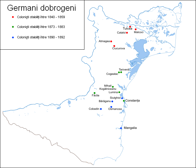 Localităţile colonizate de către germani în Dobrogea.